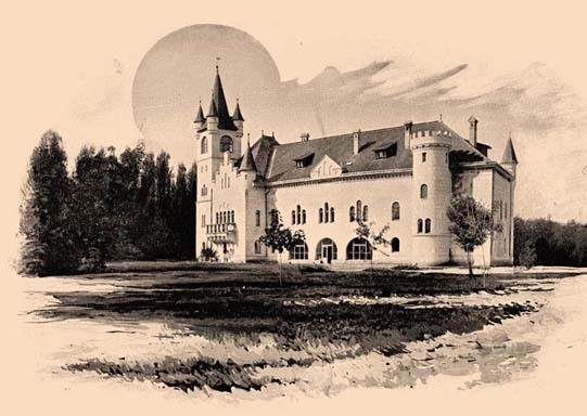 A felújított rozsályi kastély az 1800-as évek végén